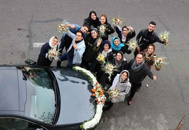 گل آرایی